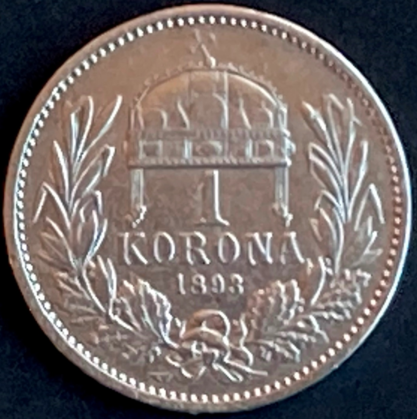 1 korona 1893 - reverse